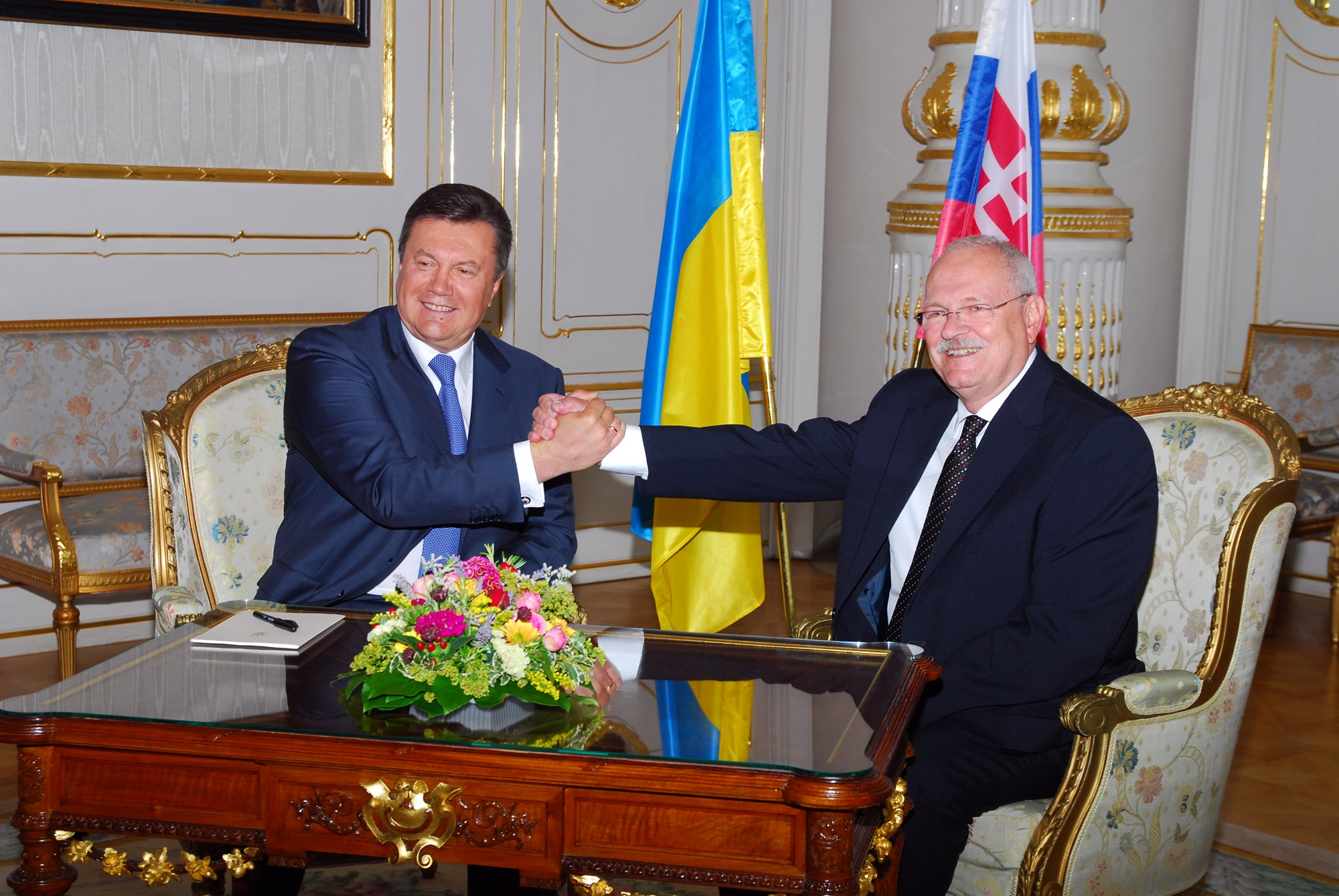 Viktor Janukovyč - prezident Ukrajiny, Ivan Gašparovič - prezident SR